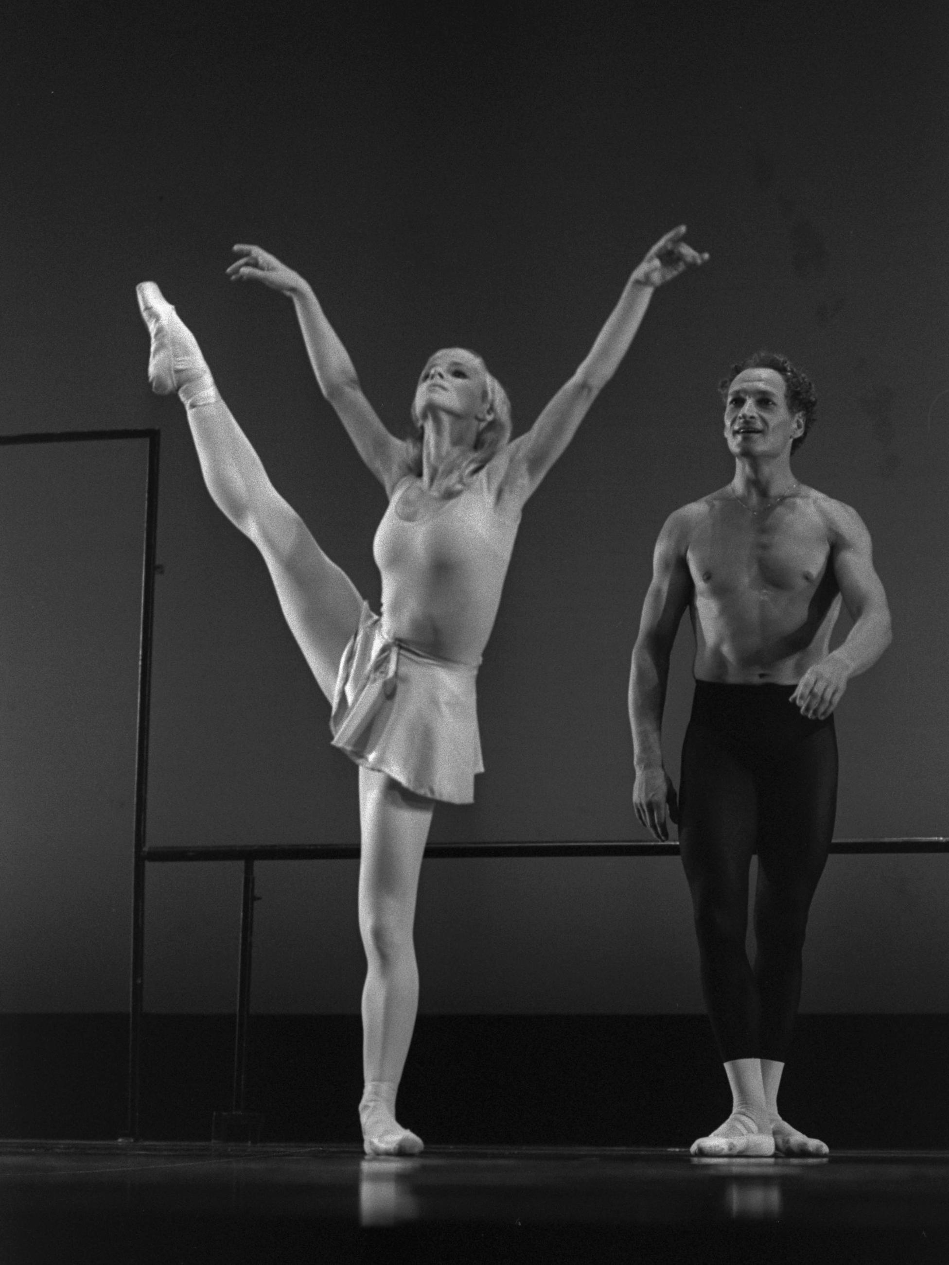 Galina and Valery Panov in the show - Afternoon of a Faun - performed during the Israel Festival at the Mann Auditorium in Tel Aviv. גלינה וולרי פאנוב בהופעה - אחהצ של פאון - במהלך פסטיבל ישראל בתל אביב